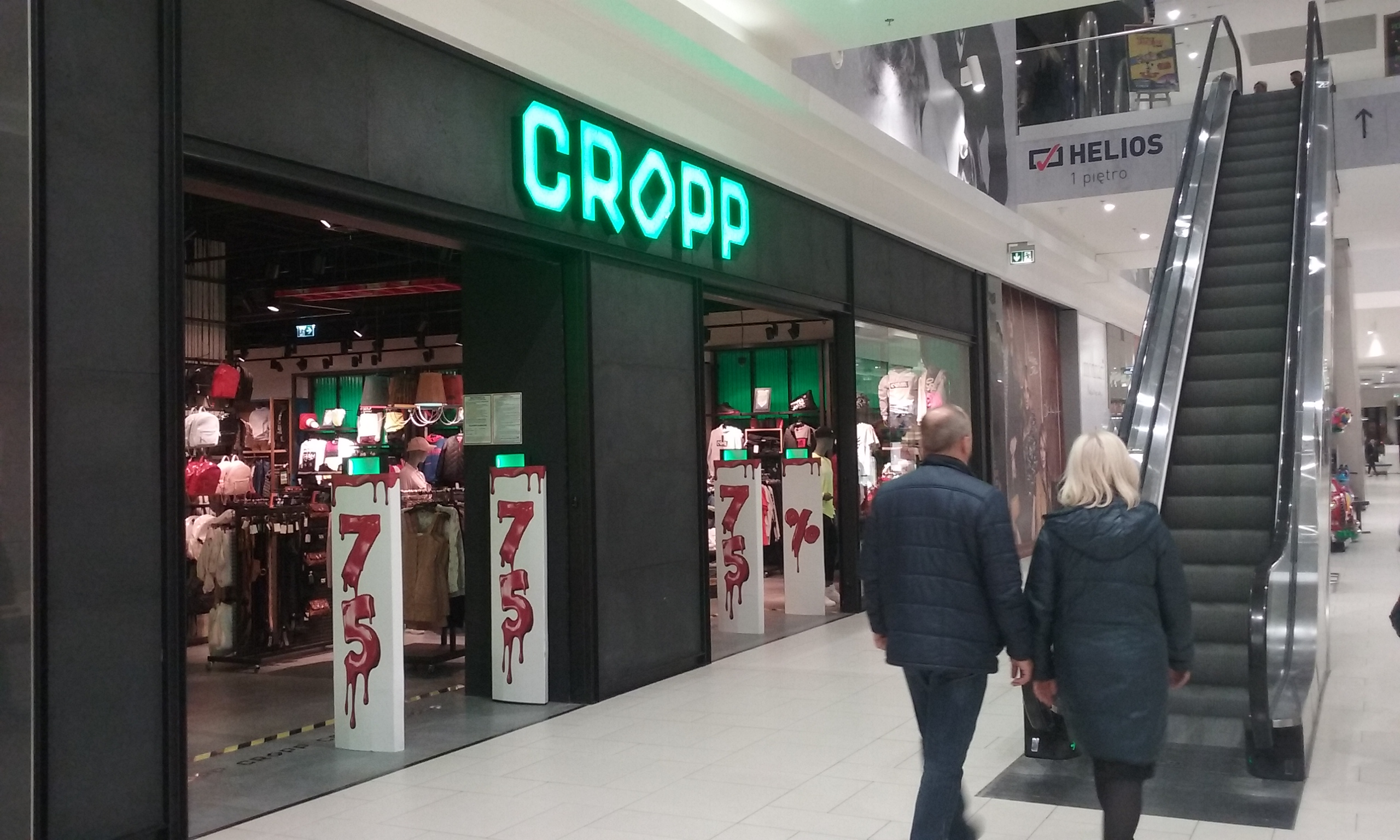 Salon odzieżowy marki polskiej marki Cropp (LPP) w 60-tysięcznym Tomaszowie Mazowieckim